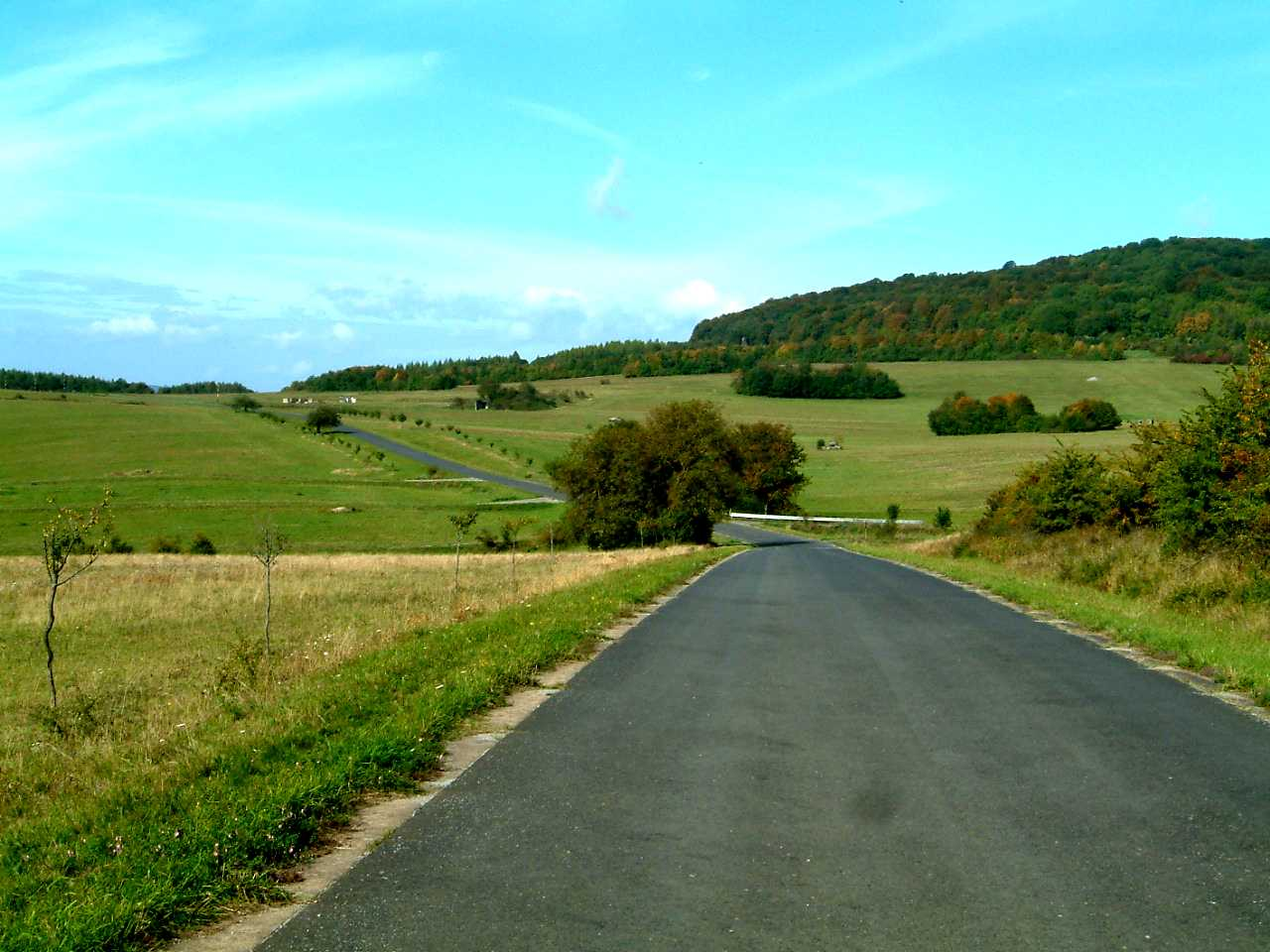 Truppenübungsplatz Hammelburg südlich des ehm. Reussenberger Hofes